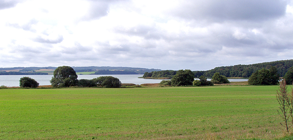 Mossø set fra nordøst ved Alken. Skanderborg Amt, Jylland , Denmark. Image by user:Nico-dk / Nils Jepsen